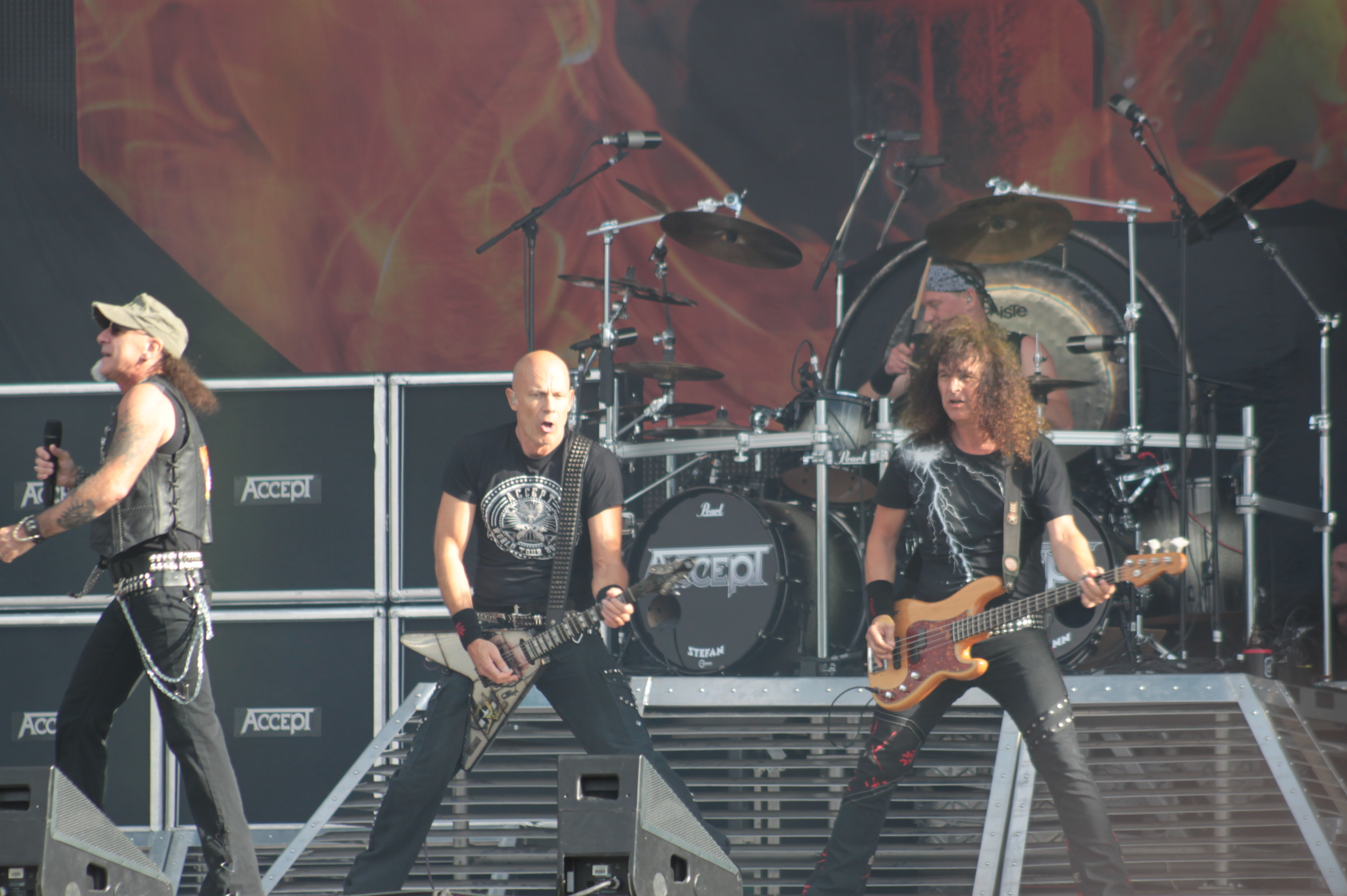 Accept, Helfest 2013, Fr-44-Clisson.